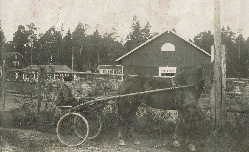 Ravi harjoitus